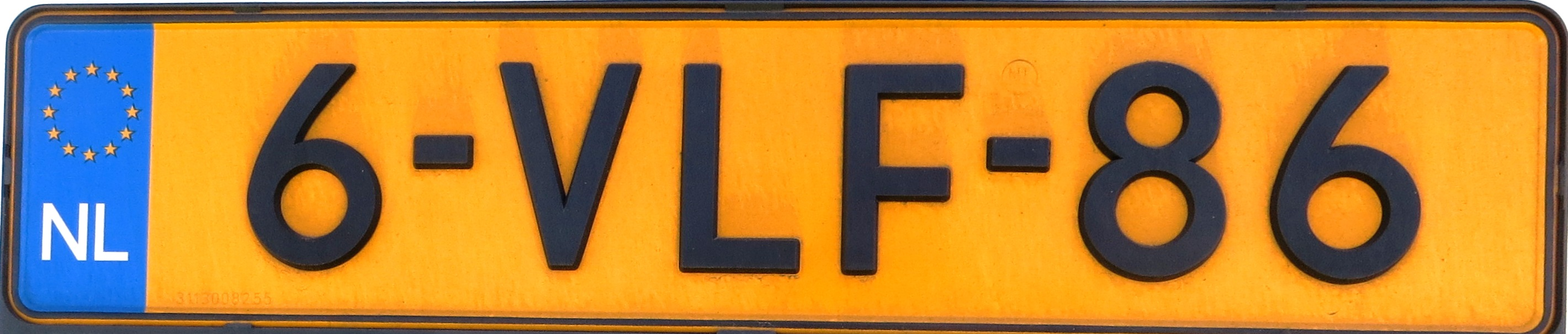 sidecode 8